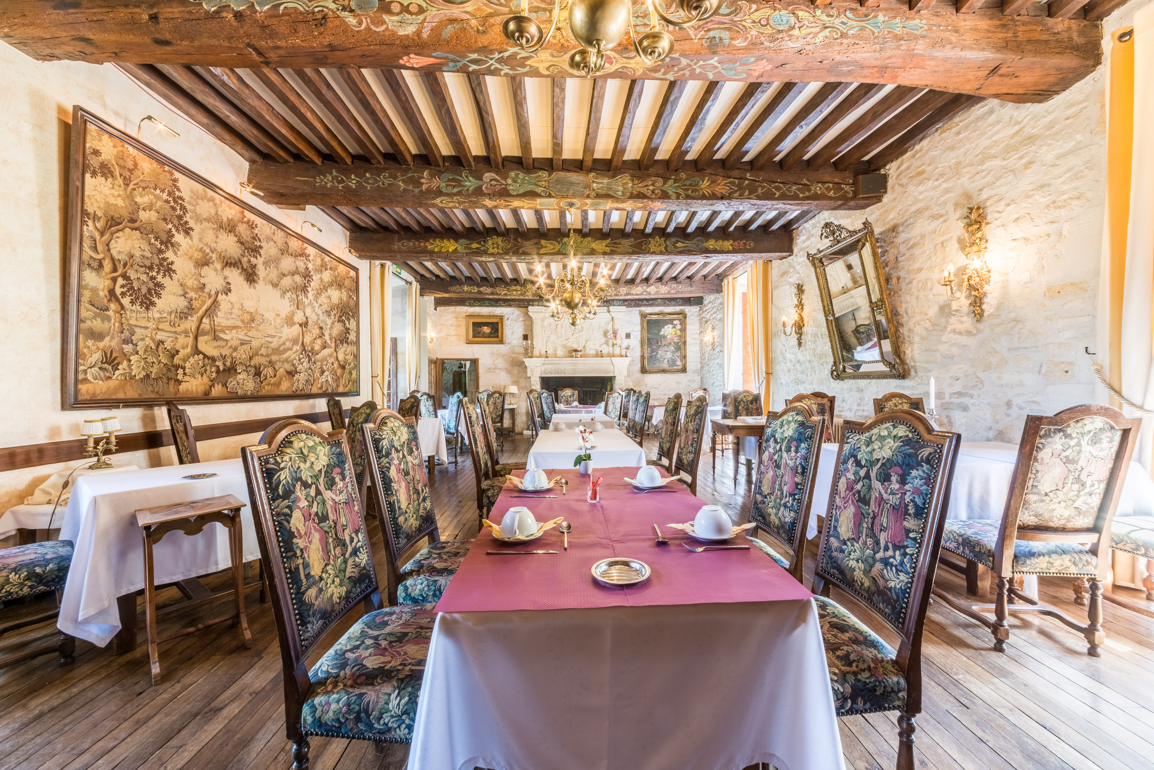 Restaurant du château La Fleunie